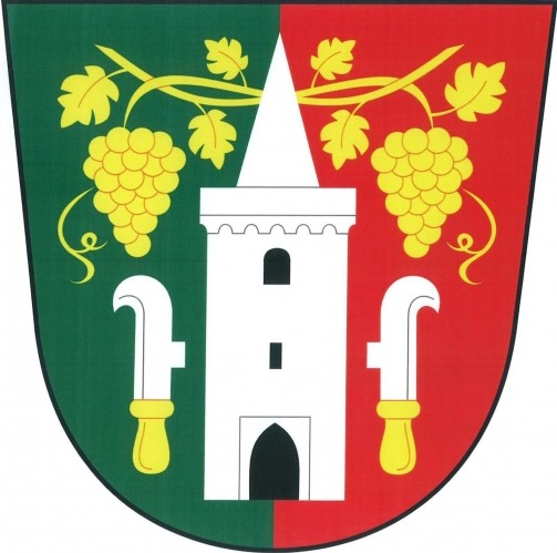 znak, Suchohrdly u Miroslavi, okres Znojmo